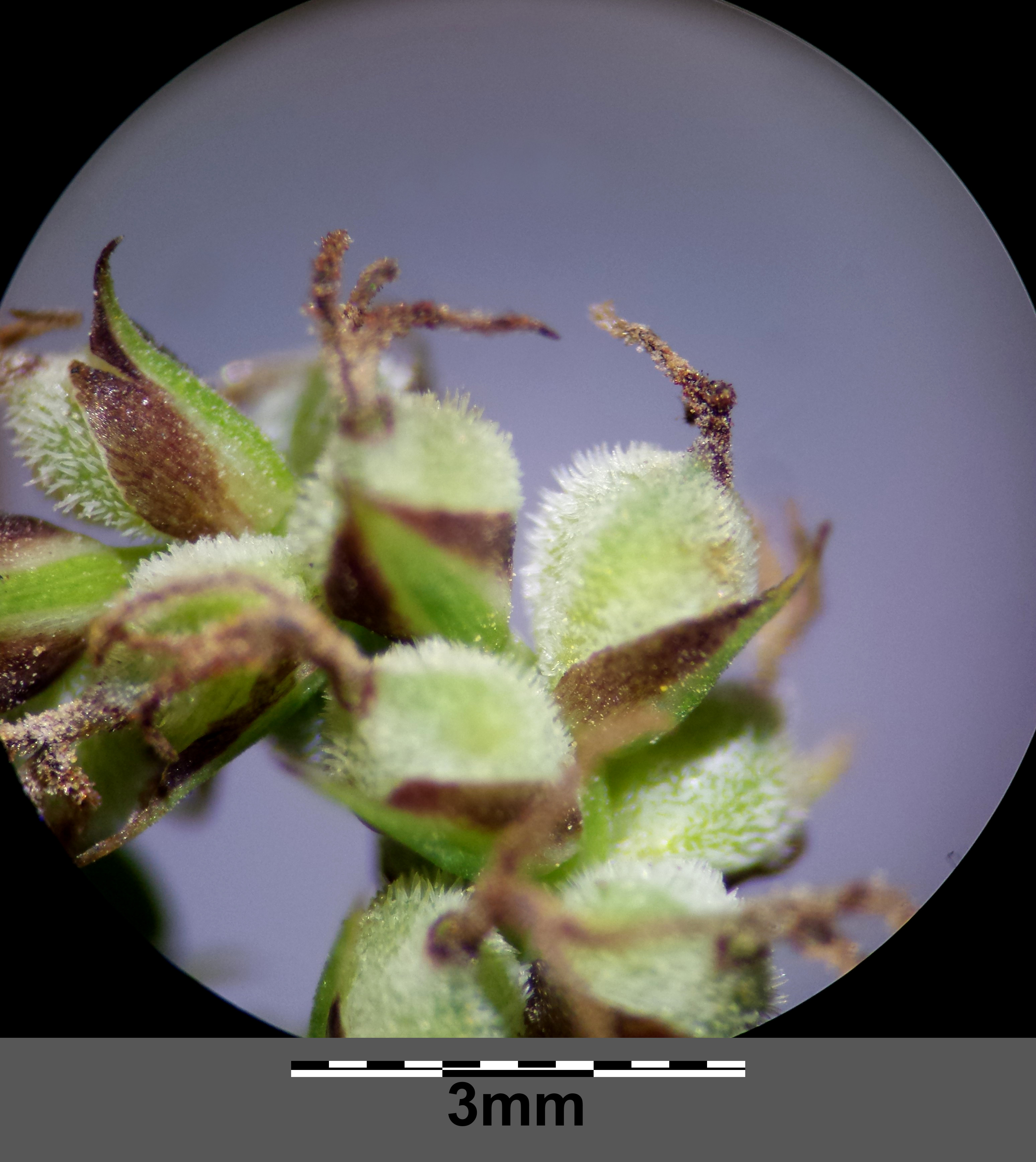 ♀ Ähre (Ausschnitt), die Schläuche sind dicht weißlich-kurzhaarig Taxonym: Carex tomentosa ss Fischer et al. EfÖLS 2008 ISBN 978-3-85474-187-9 Fundort: nächst der Martenhofen-Lacken im Seewinkel, Bezirk Neusiedl am See, Burgenland, Österreich - ca. 120 m ü. A. Standort: salzhältige Wiese